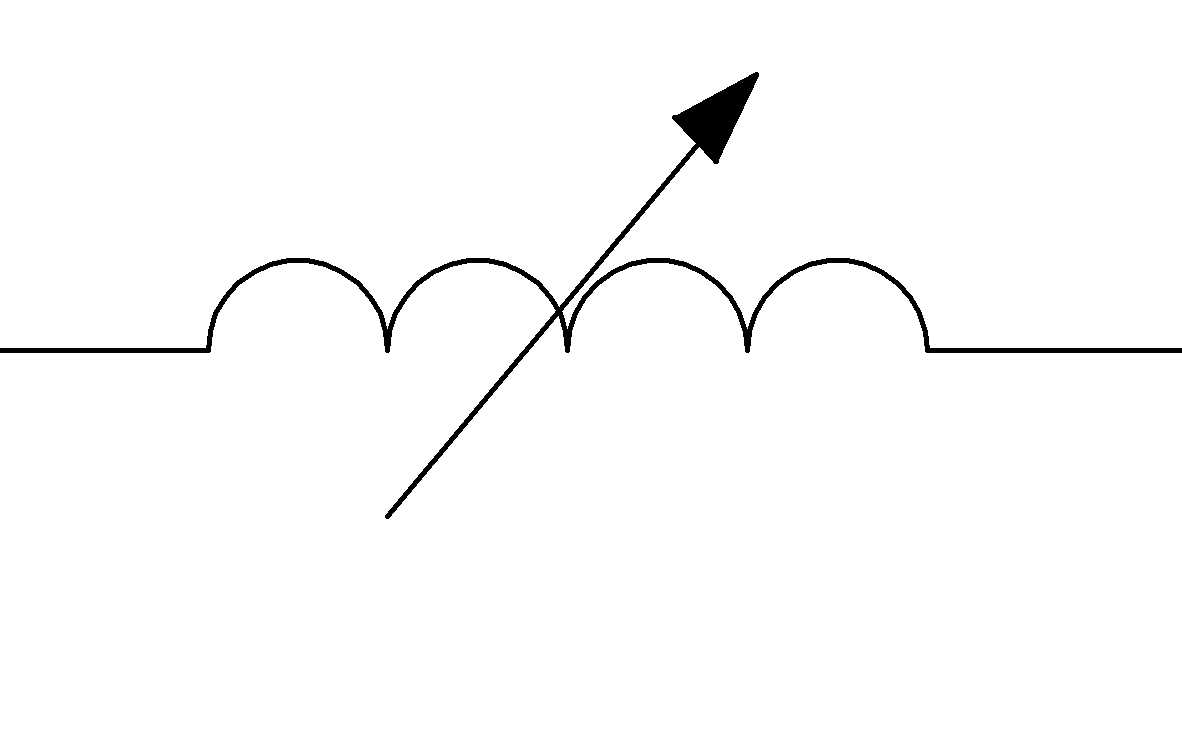 Reguleeritav pool